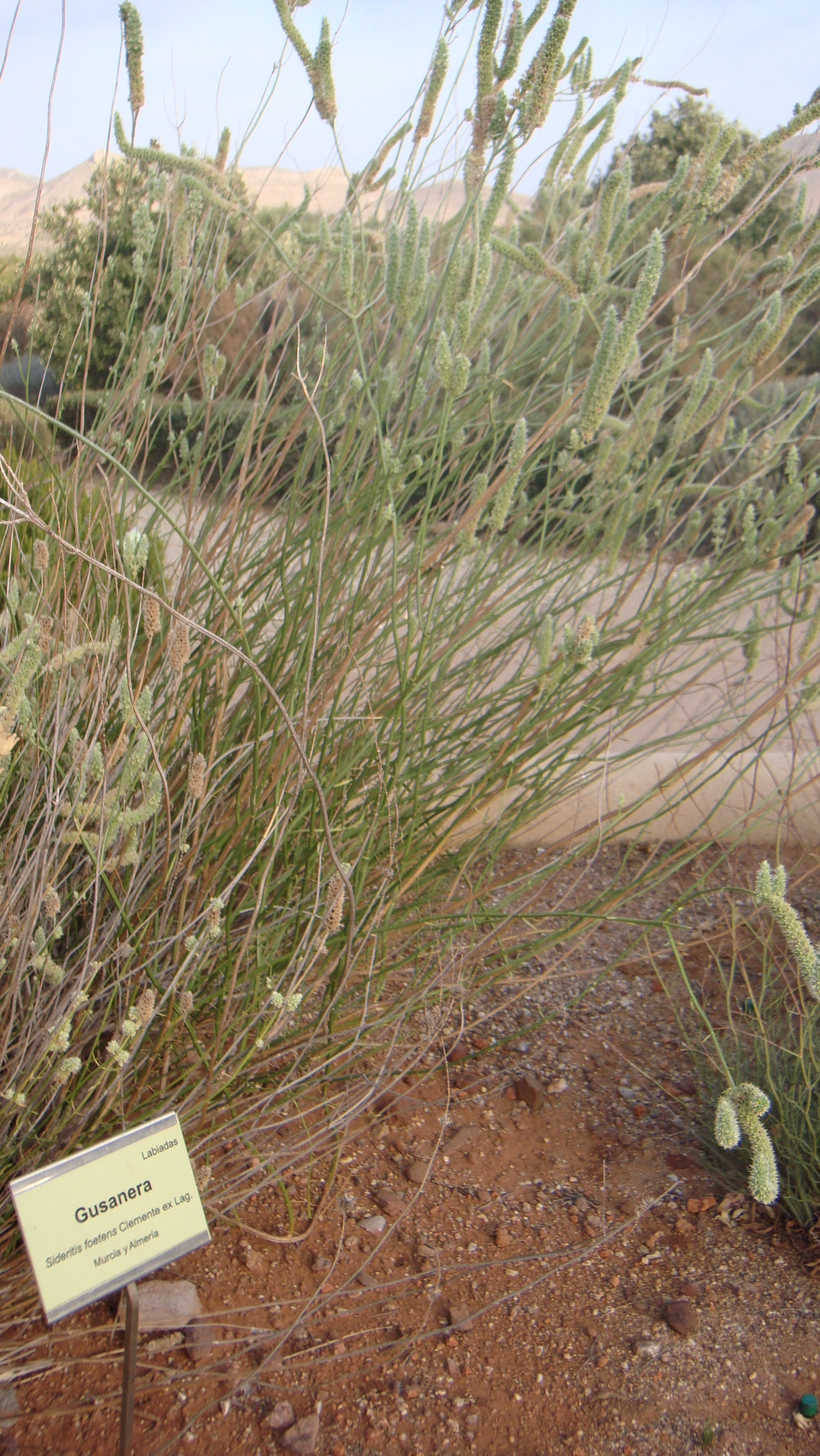 planta en el Jardín Botánico del Albardinal de Rodalquilar, en Nijar, provincia de Almería (España). Se encuentra dentro del Parque natural del Cabo de Gata-Níjar.